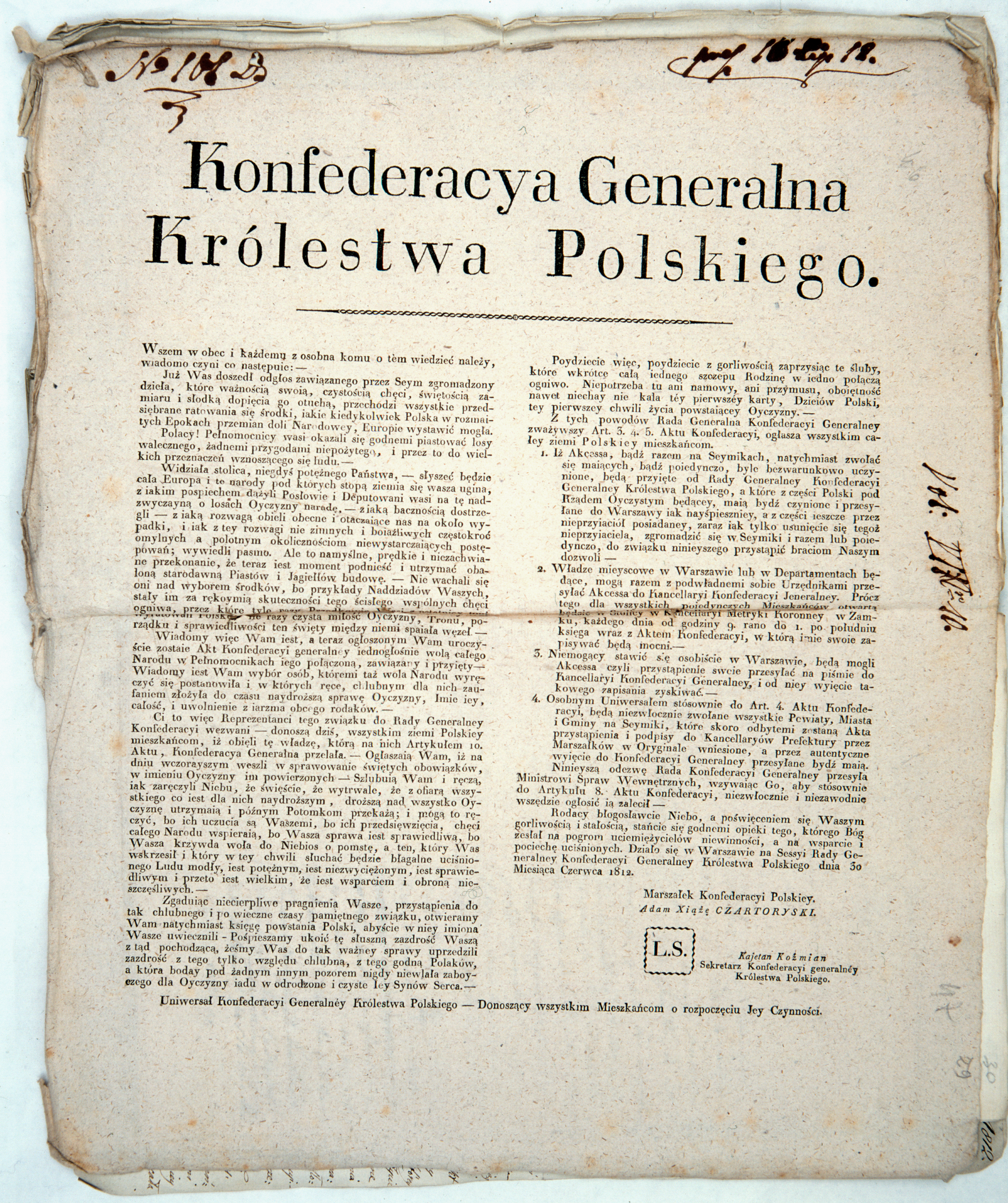 Uniwersał Konfederacji Królestwa Polskiego – donoszący wszystkim mieszkańcom o rozpoczęciu jej czynności